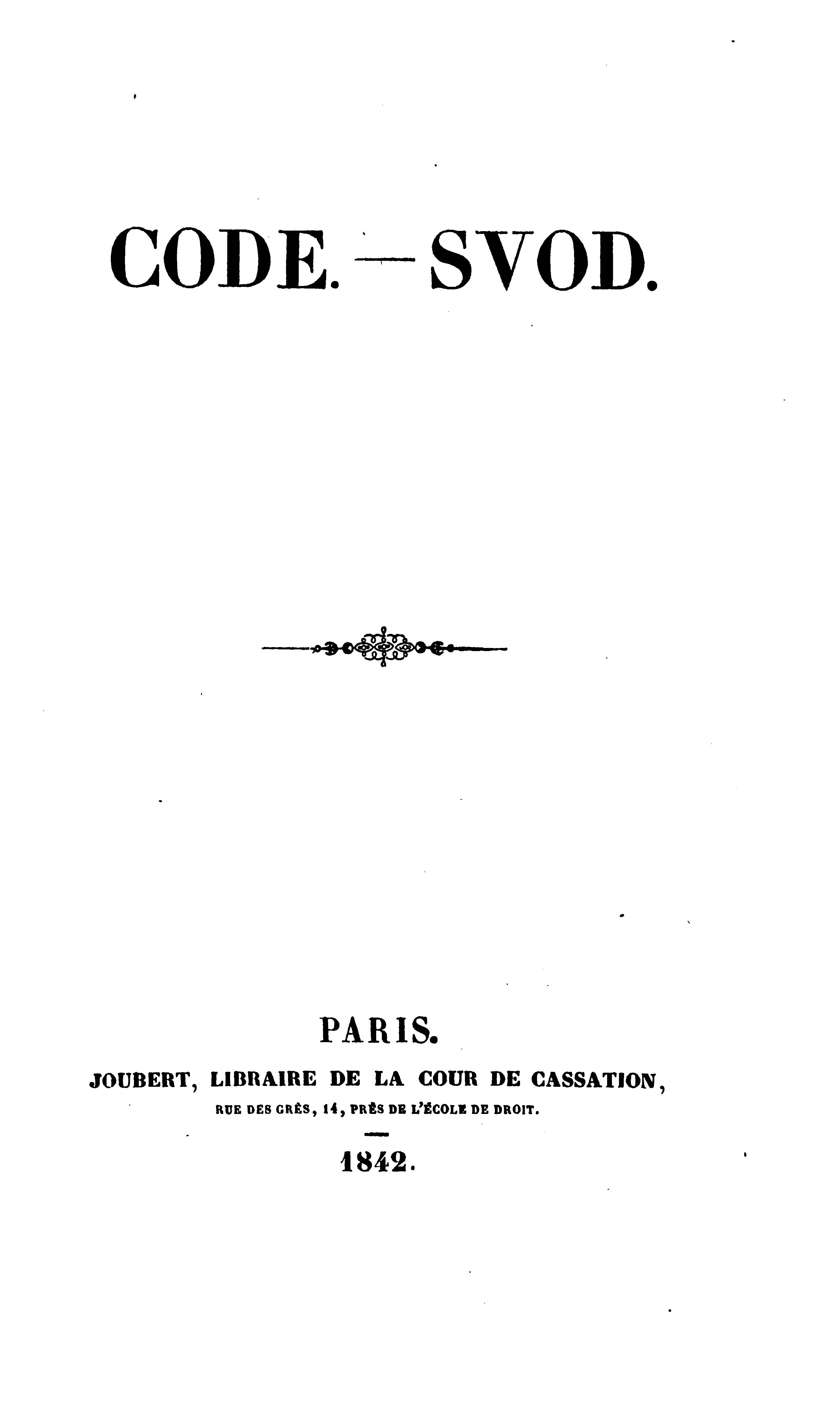 Code: Svod